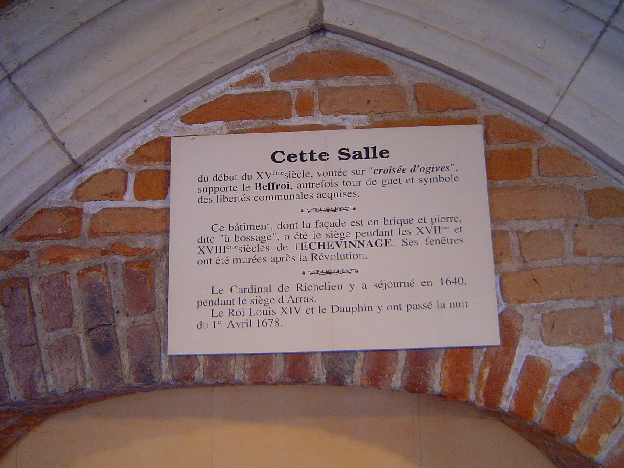 Photos prises dans la commune de Doullens (Somme)